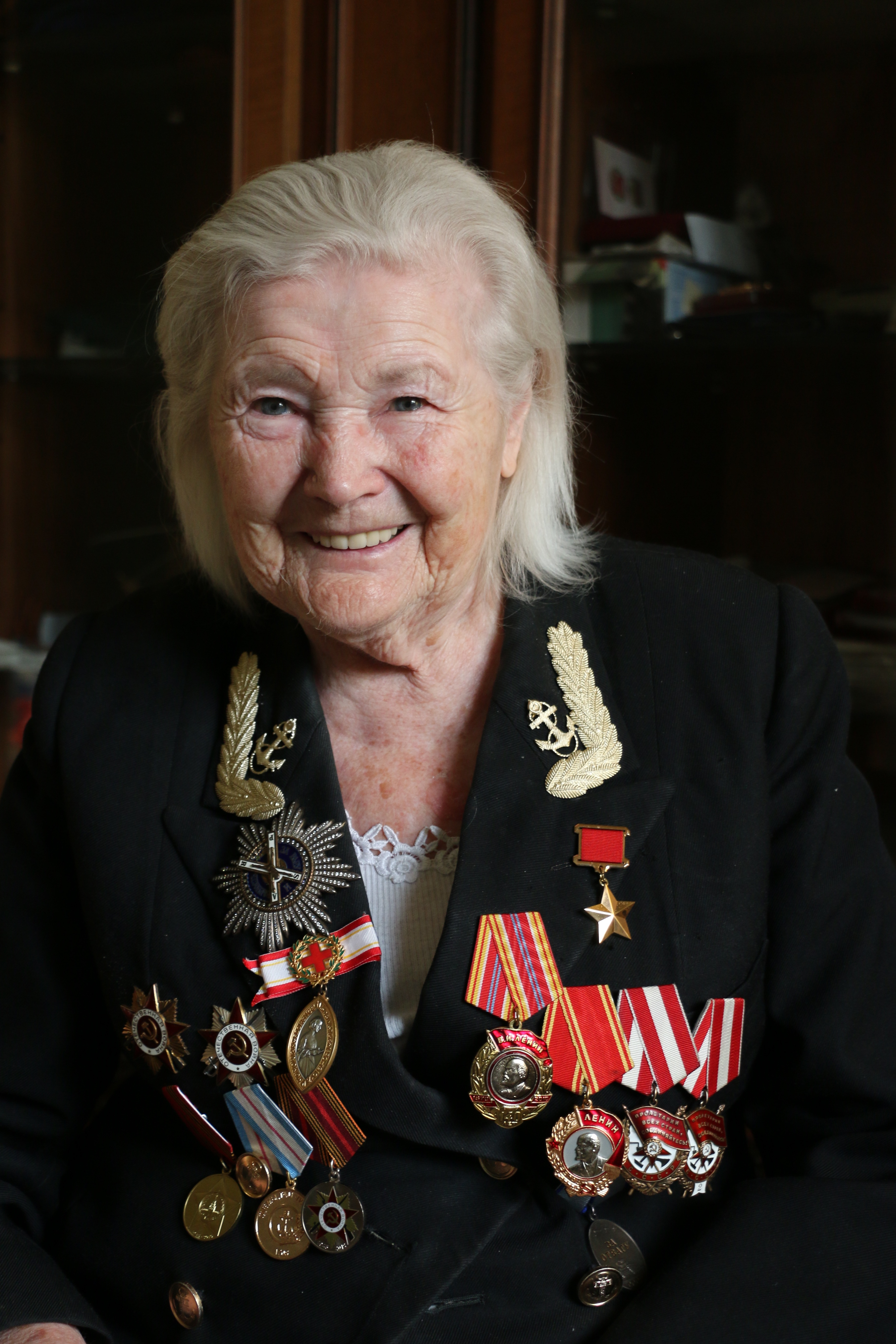 Екатерина Илларионовна у себя дома, июнь 2016 г.